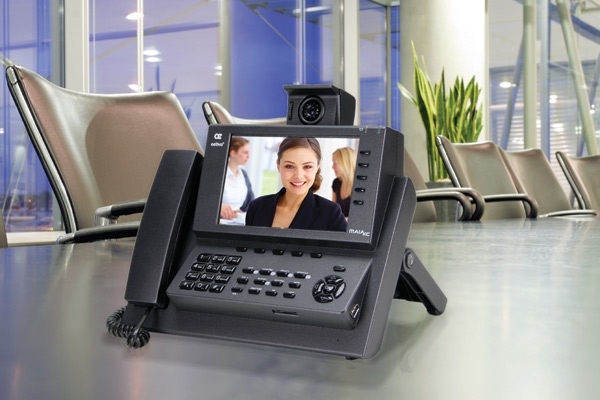 Видеотелефон Aethra Maia XC